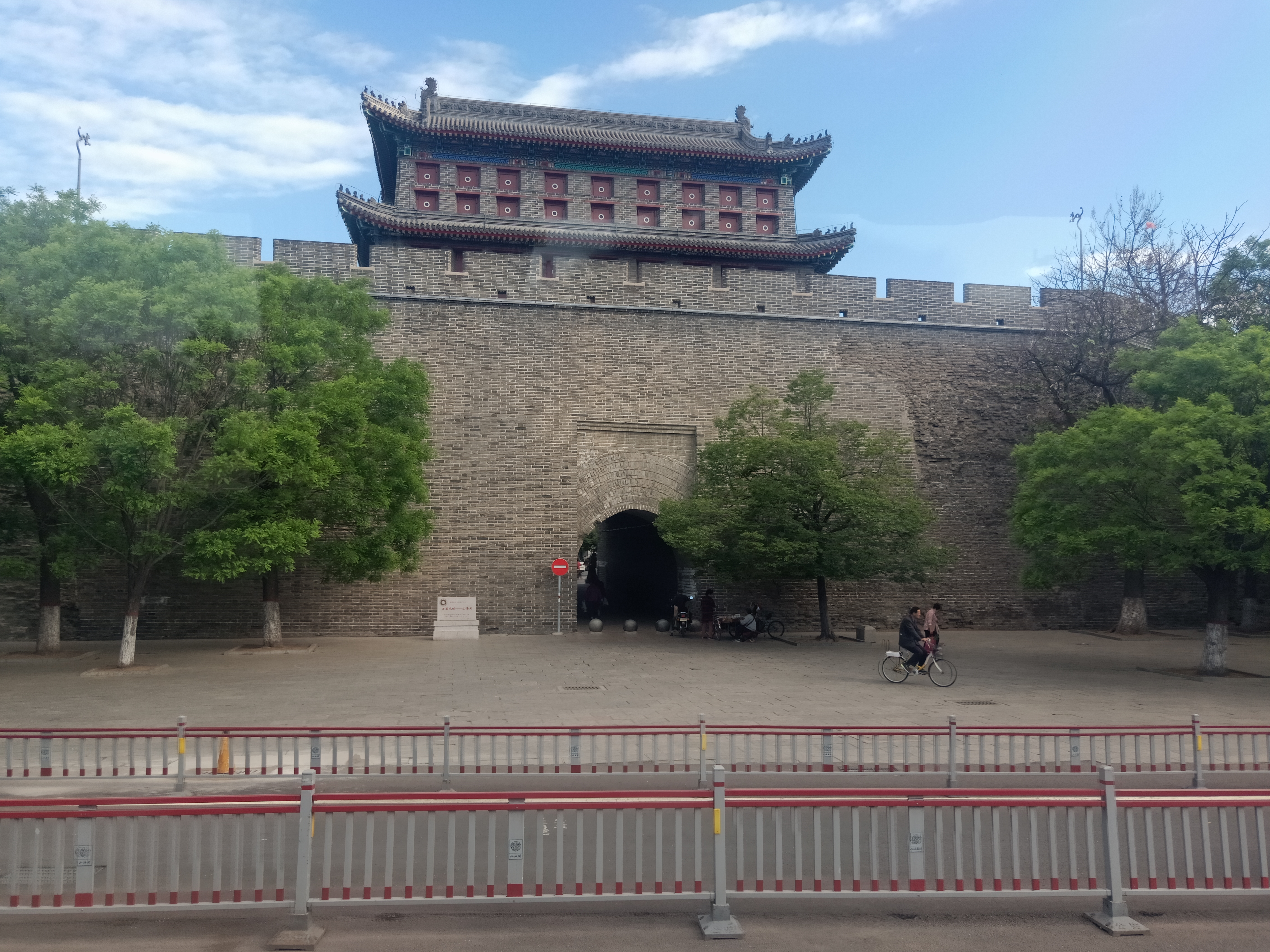 粵語: 山海關景區近住路邊嘅城樓